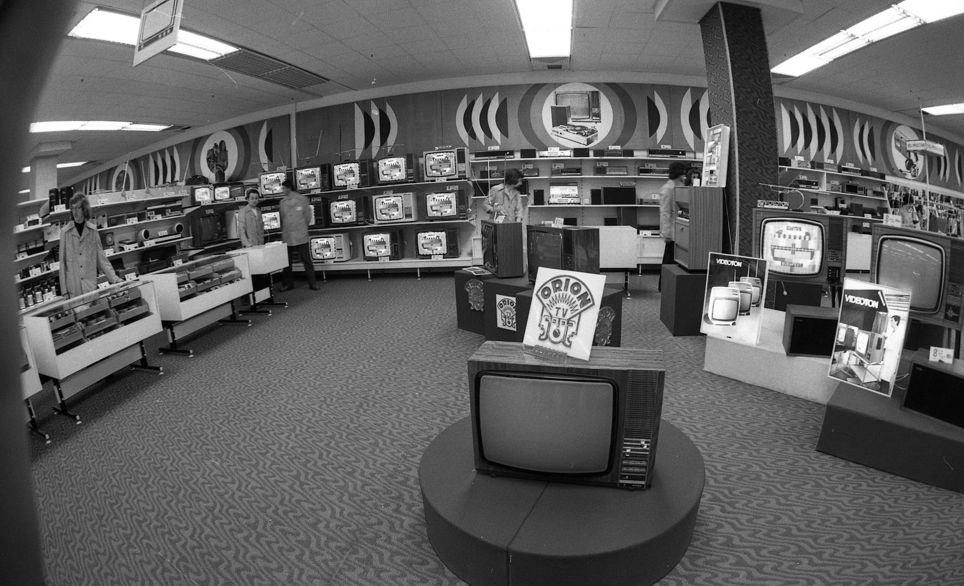 Október huszonharmadika (Schönherz Zoltán) utca, Skála Budapest Szövetkezeti Nagyáruház, a felvétel a megnyitáskor készült. Location: Hungary, Budapest XI. Tags: Orion-brand, Videoton-brand, TV, Skála department store, Budapest Title: Október huszonharmadika (Schönherz Zoltán) utca, Skála Budapest Szövetkezeti Nagyáruház, a felvétel a megnyitáskor készült.